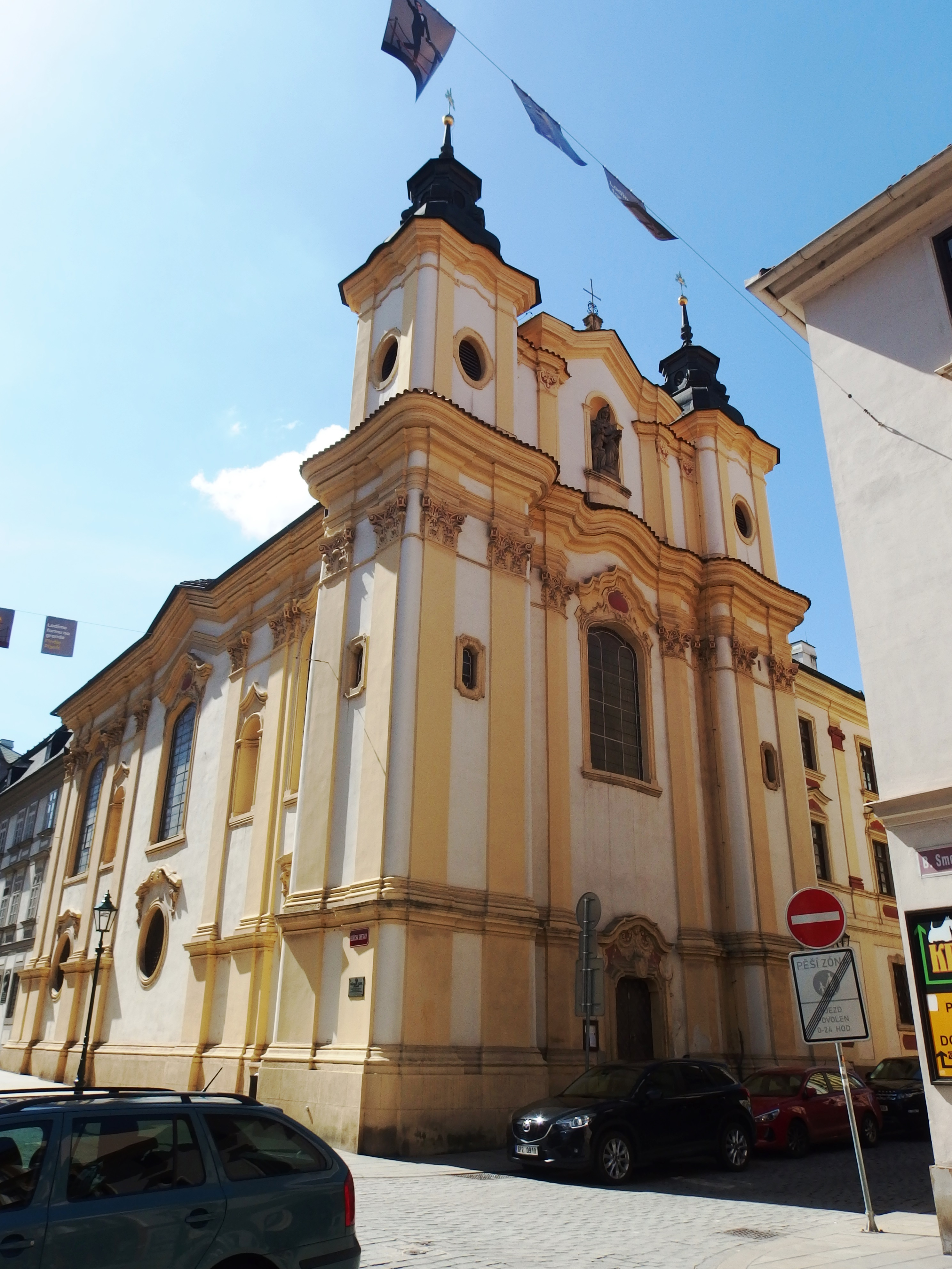 Klášter dominikánek s kostelem svaté Anny, Bezručova 179/19, Smetanovy sady 179/2, Bedřicha Smetany 179/14, Plzeň.